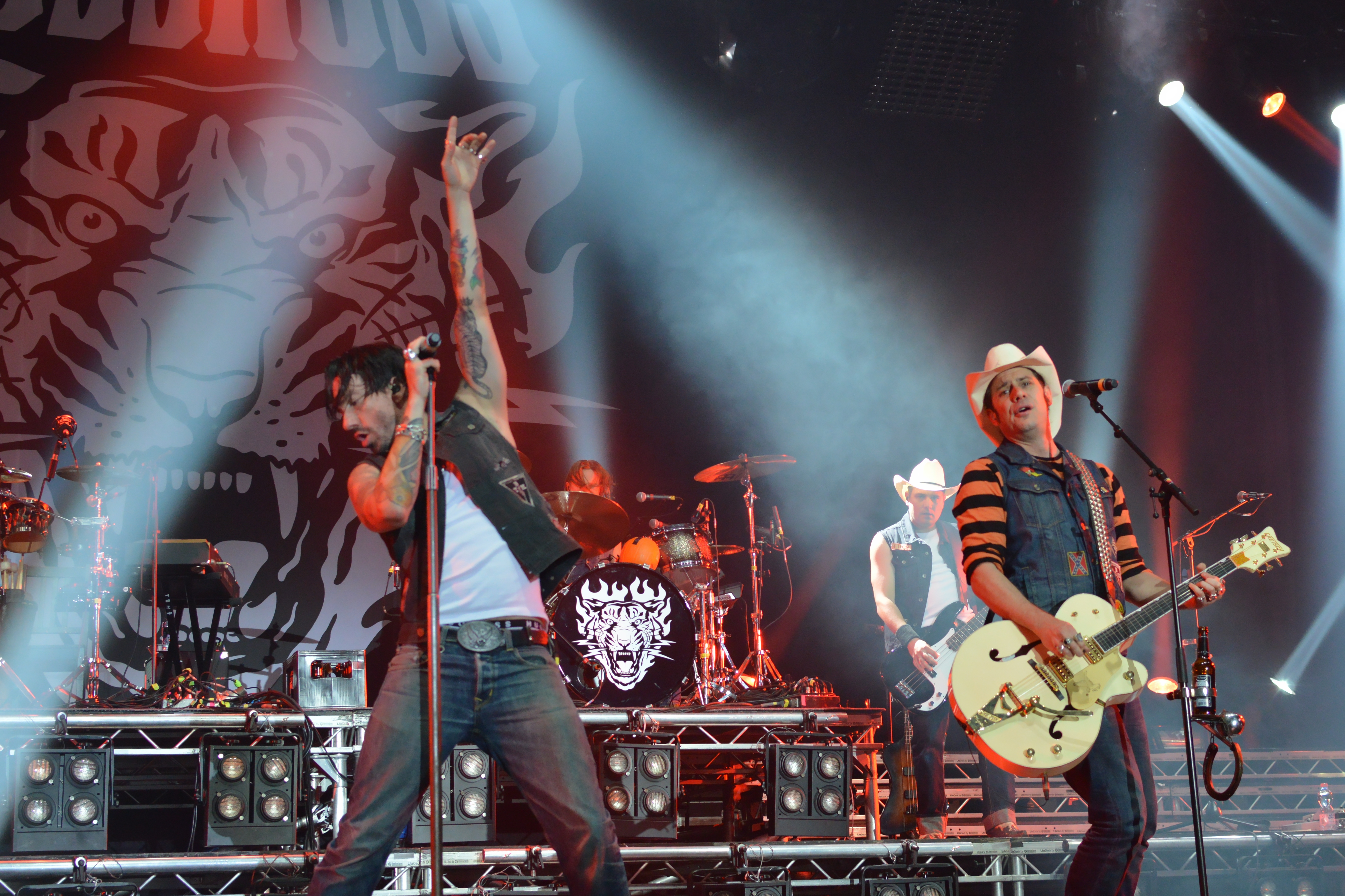 The BossHoss in der König-Pilsener-Arena Oberhausen.